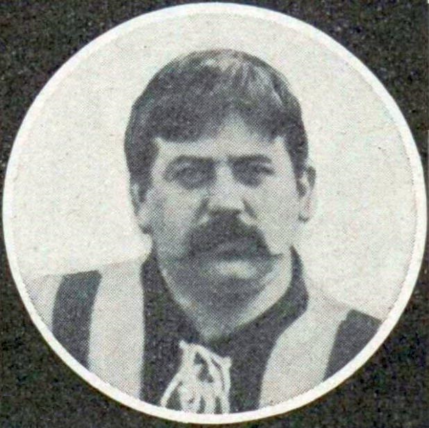 Gaston Cyprès footballeur, vers 1900.